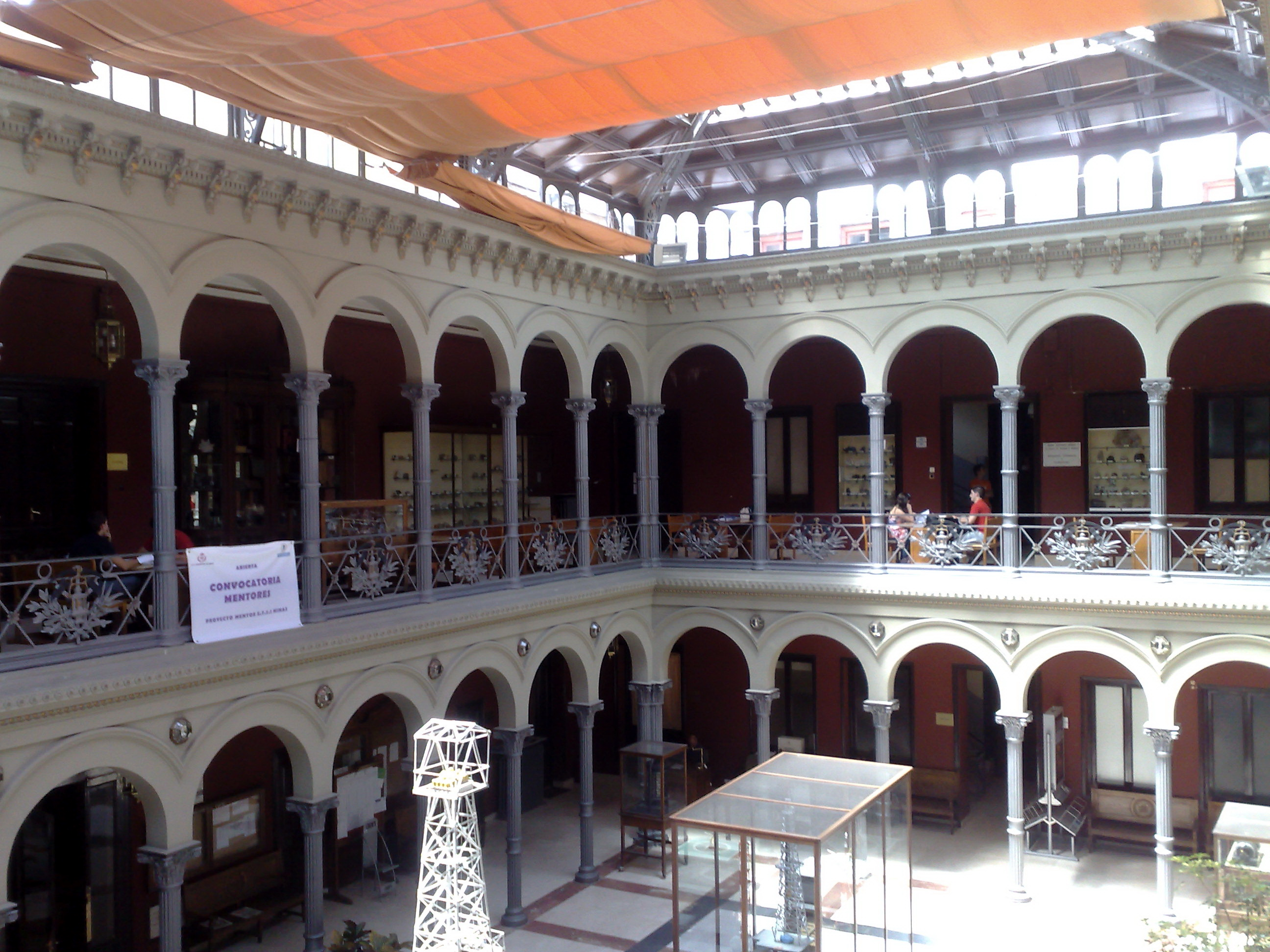 Vista del patio interior del edificio M1 de la Escuela Técnica Superior de Ingenieros de Minas de Madrid (España), en el nº 21 de la Calle de Ríos Rosas. Fue proyectado en 1884 por Ricardo Velázquez Bosco y construido entre 1886 y 1893.